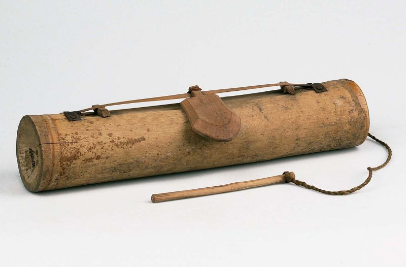 Slaginstrument. Buisciter met één snaar Unknown language: Guntang